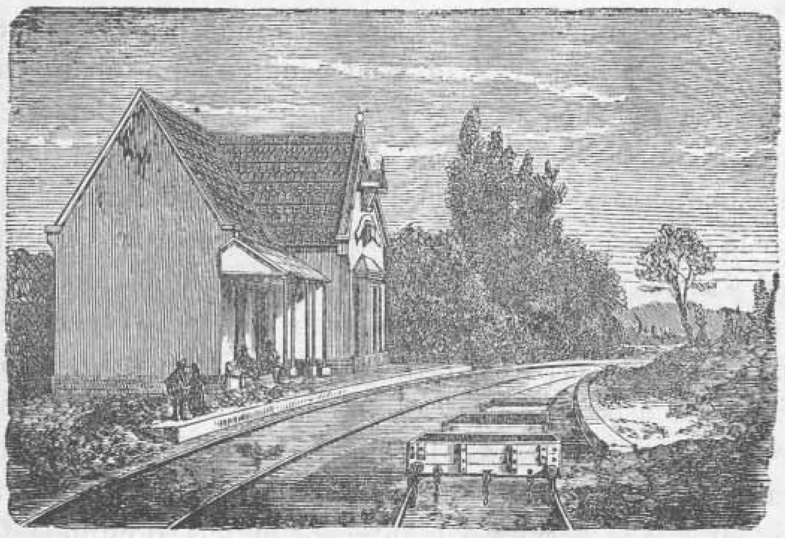 Grabado de la Estación de Trenes La Cruz, obtenido desde el libro de Benjamín Vicuña Mackenna: "De Valparaíso a Santiago" (1877)